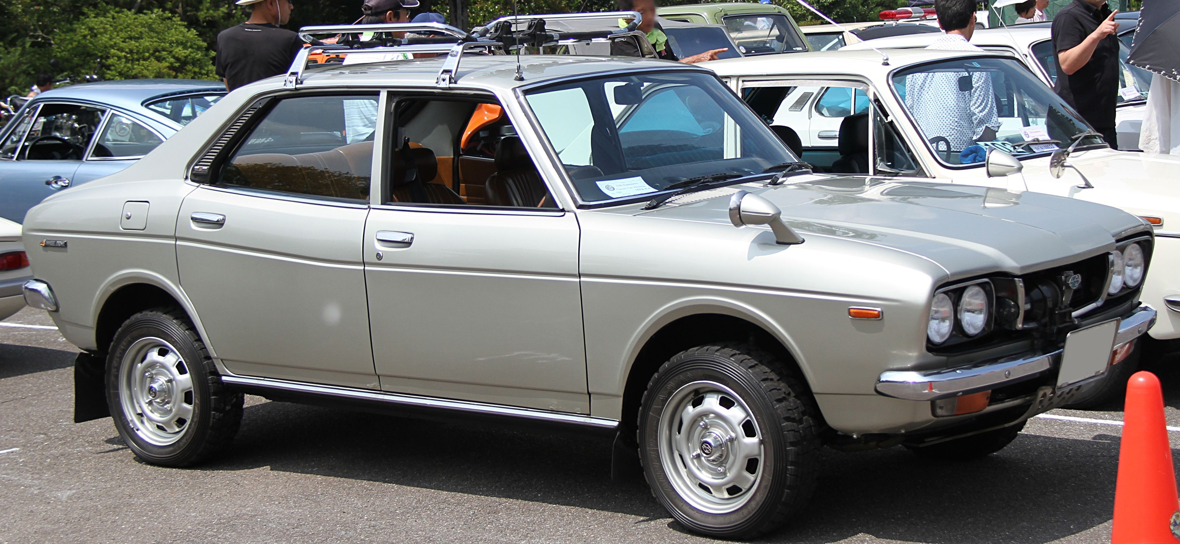 1976 Subaru Leone 4 Door Sedan 4WD